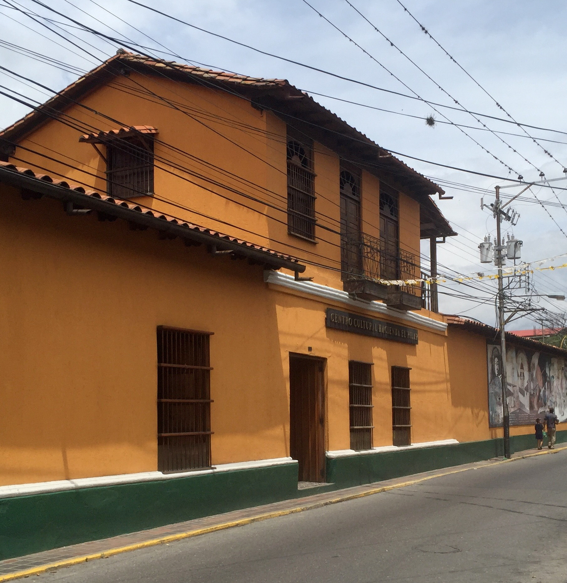 Fundación Hacienda El Pilar en Ejido, estado Mérida.